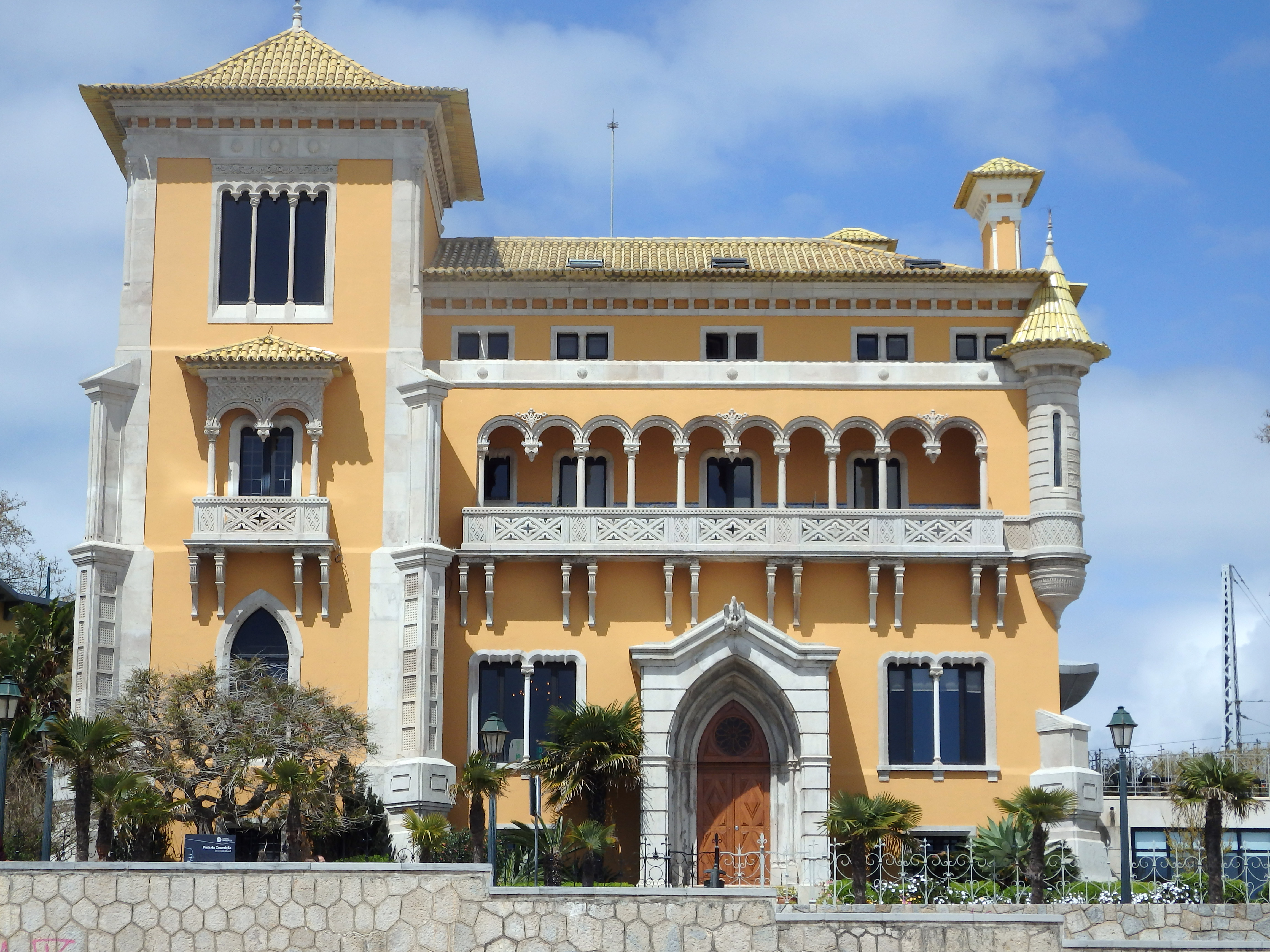 Portugal